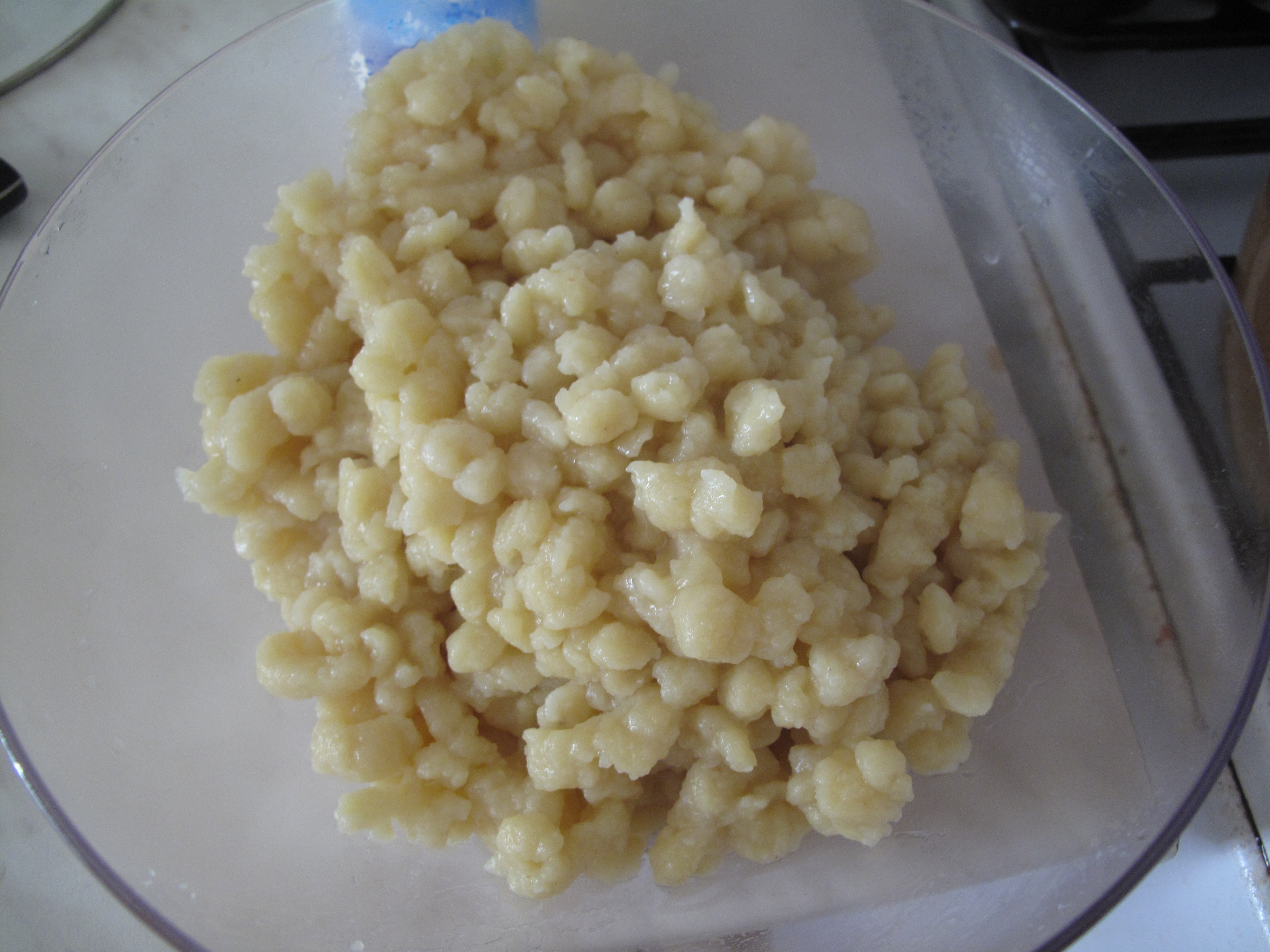 Chlupaté knedlíky